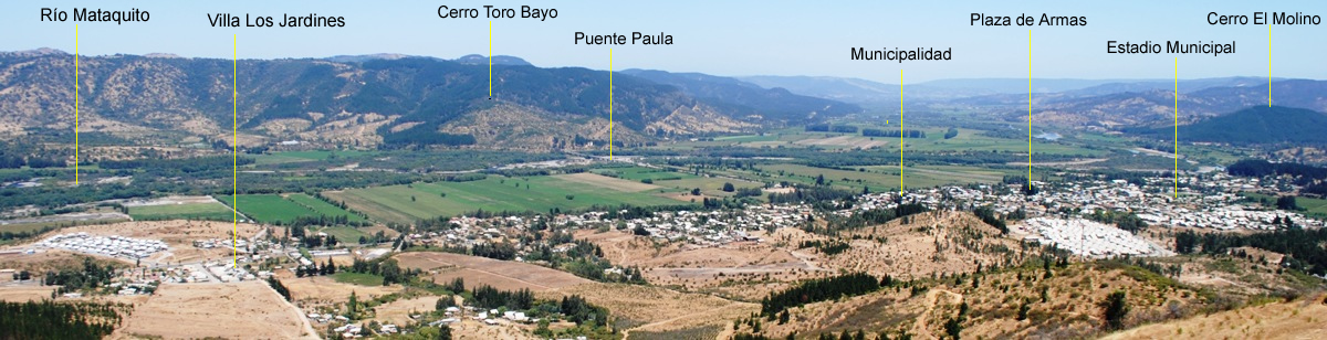 Vista panorámica de Hualañé desde cordón norte